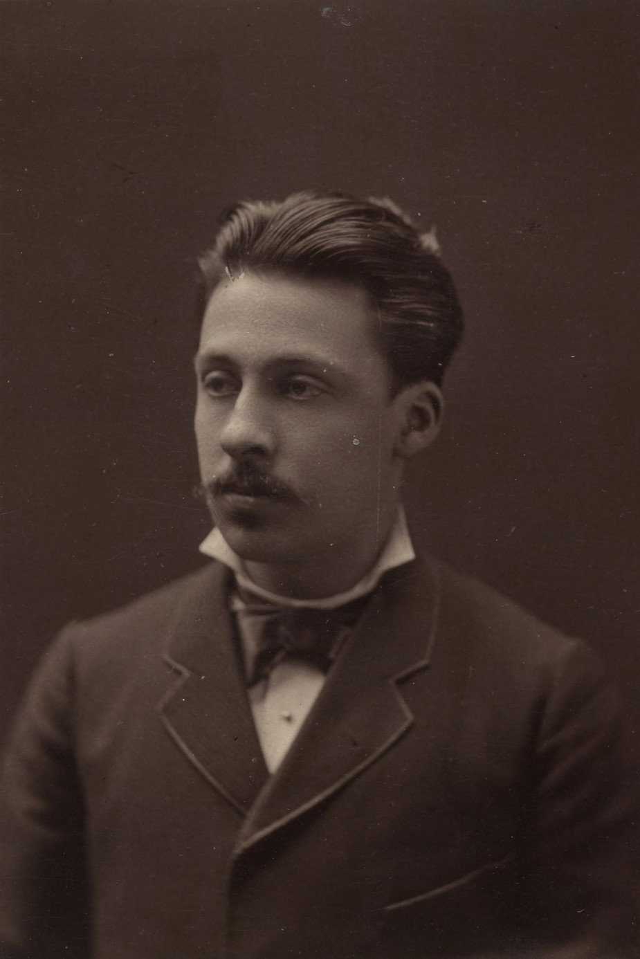 Fotografia Francisco de Paula Ramos de Azevedo.